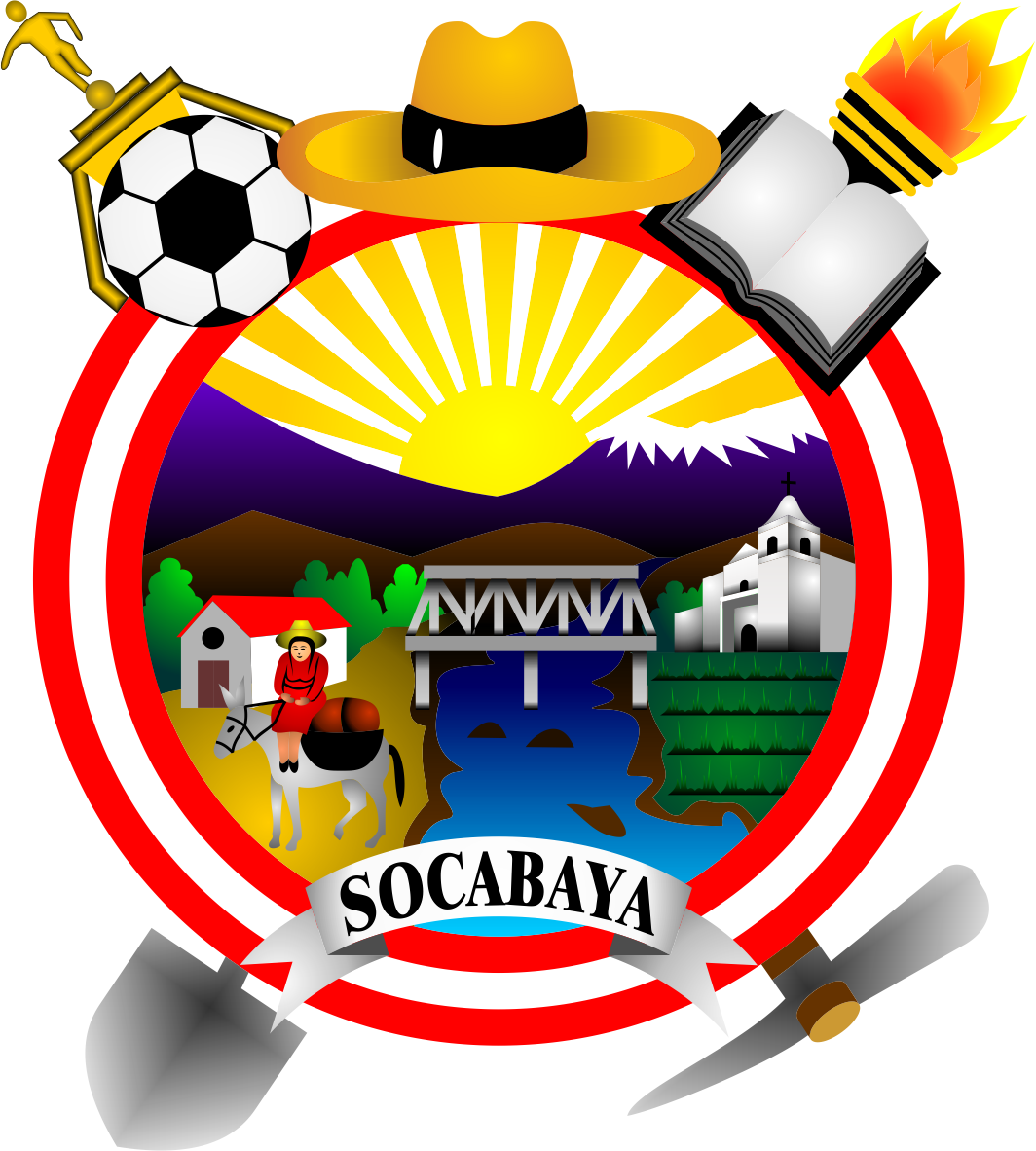 Distrito de Socabaya